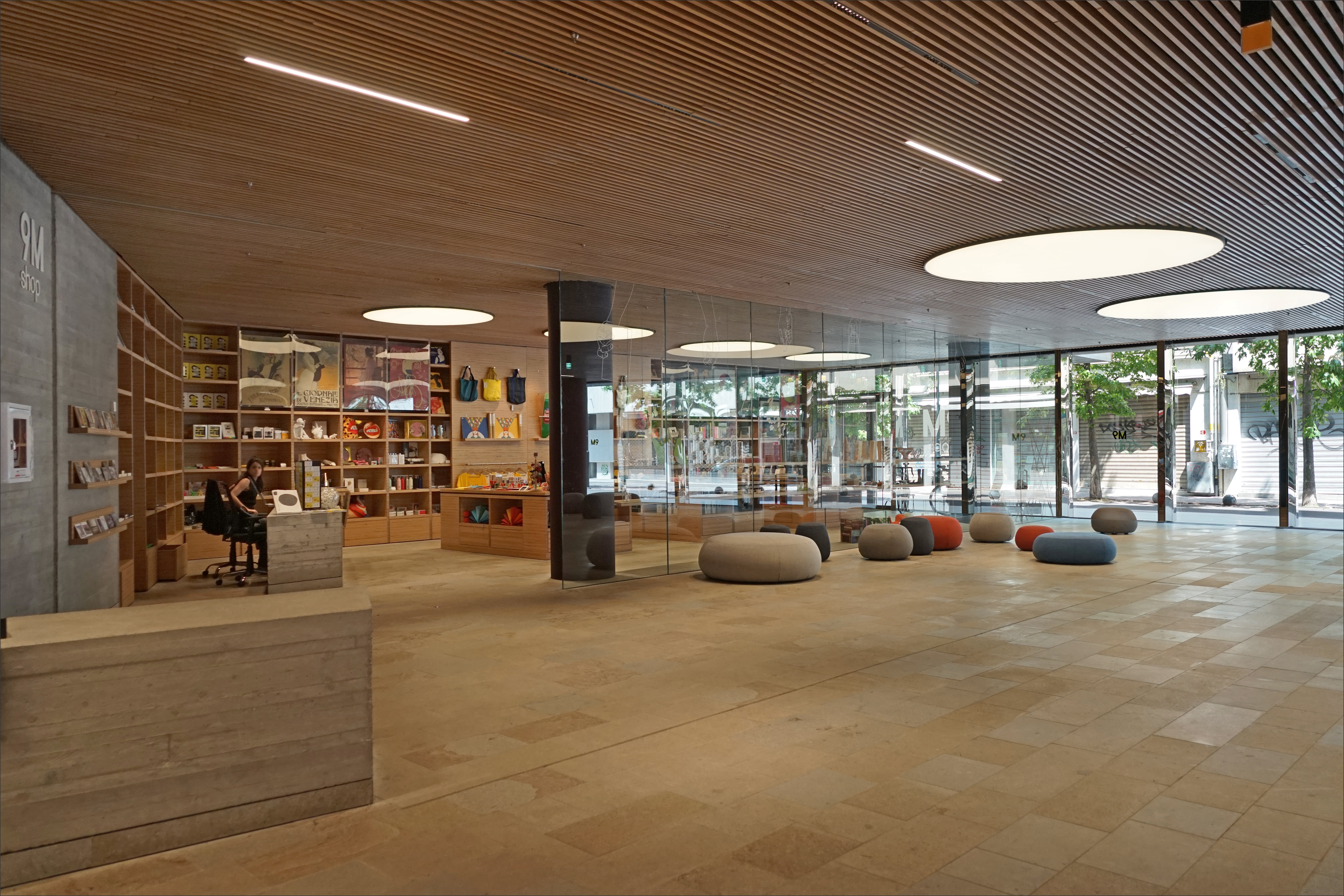 Une partie du rez-de-chaussée du musée avec la boutique à gauche Le musée M9 (musée du "Novecento" / musée du XXème siècle) à Mestre a été conçu par le studio allemand d'architecture de Matthias Sauerbruch et Louisa Hutton. C'est un bâtiment qui est chauffé l'hiver à 100% et refroidi l'été à 40% par la géothermie. Il est également doté de 276 panneaux photovoltaïques. Les murs extérieurs sont recouverts de céramiques polychromes. Le projet architectural a concerné également l'espace urbain autour du nouveau musée qui est situé en plein centre de Mestre. Le musée a été inauguré à la fin de l'année 2018. Le M9 a pour but explicite de "parcourir le passé (NDLR de l'Italie), comprendre le présent et imaginer le futur". C'est un musée de civilisation, sans collection d'objets, dans lequel les thématiques sont traitées exclusivement de manière multimédia. Les dispositifs numériques interactifs y sont nombreux, ce qui est très attractif pour un public jeune mais qui posera certainement dans l'avenir des problèmes de renouvellement en raison de leur coût élevé. On sait que les crédits nécessaires sont souvent plus faciles à obtenir des pouvoirs publics et des mécènes lors de la création d'un musée que dans les années qui suivent pour la maintenance des équipements techniques. Le site du musée M9 (Mestre, Vénétie)